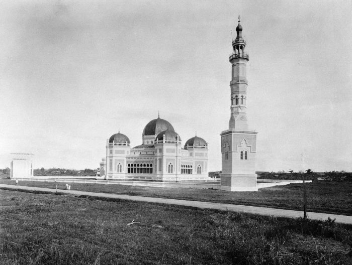 Foto. De grote moskee van Medan met de minaret op de voorgrond.